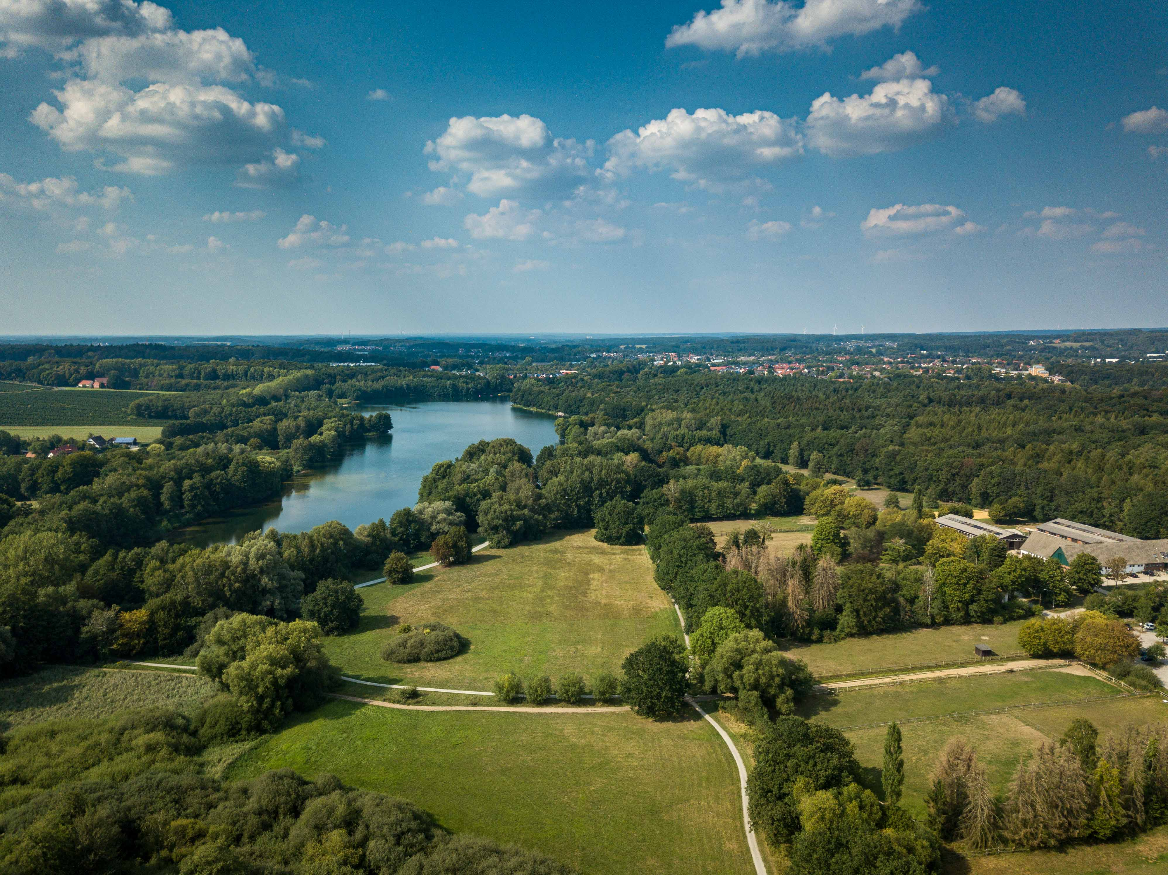 Rubbenbruchsee in Osnabrück -aufgenommen mit Mavic Pro